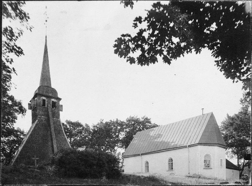 Kyrkan och klockstapeln från sydöst. Kategori: (01) ExteriörerKyrkan och klockstapeln från sydöst.